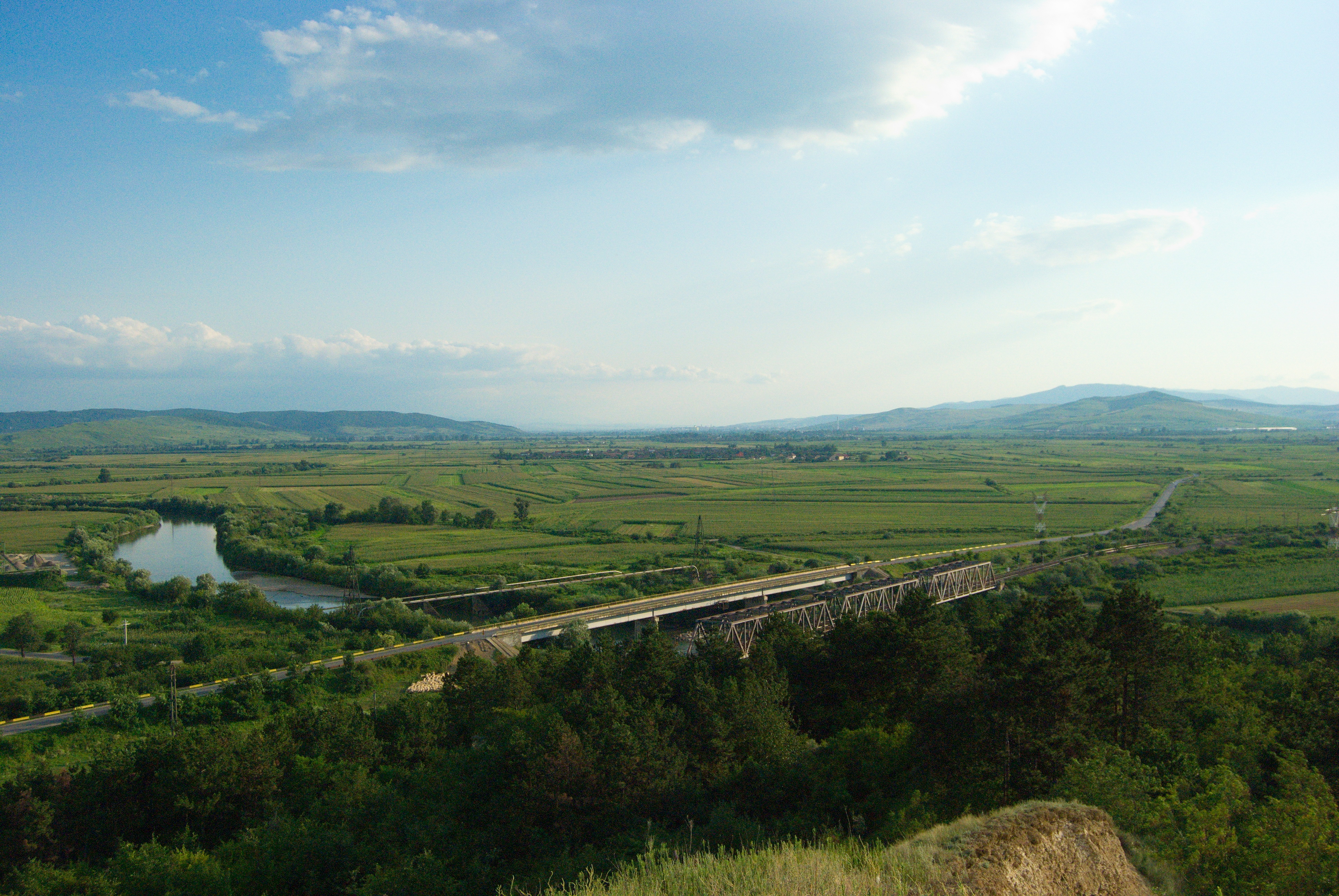 Podul de peste Mures la Mihalt